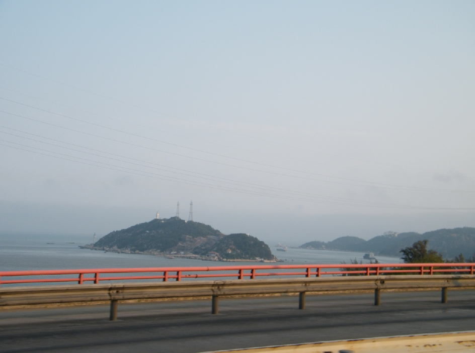 德洲岛 也叫 鹿屿 ，位于汕头港出海口